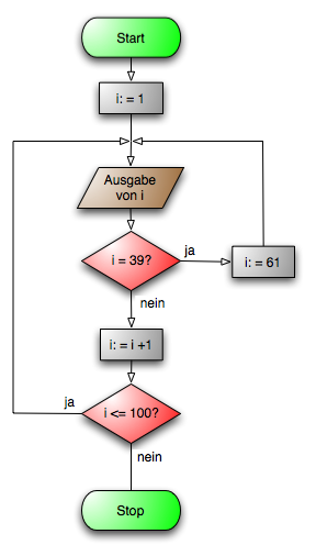 Flussdiagramm (Programmablaufplan)